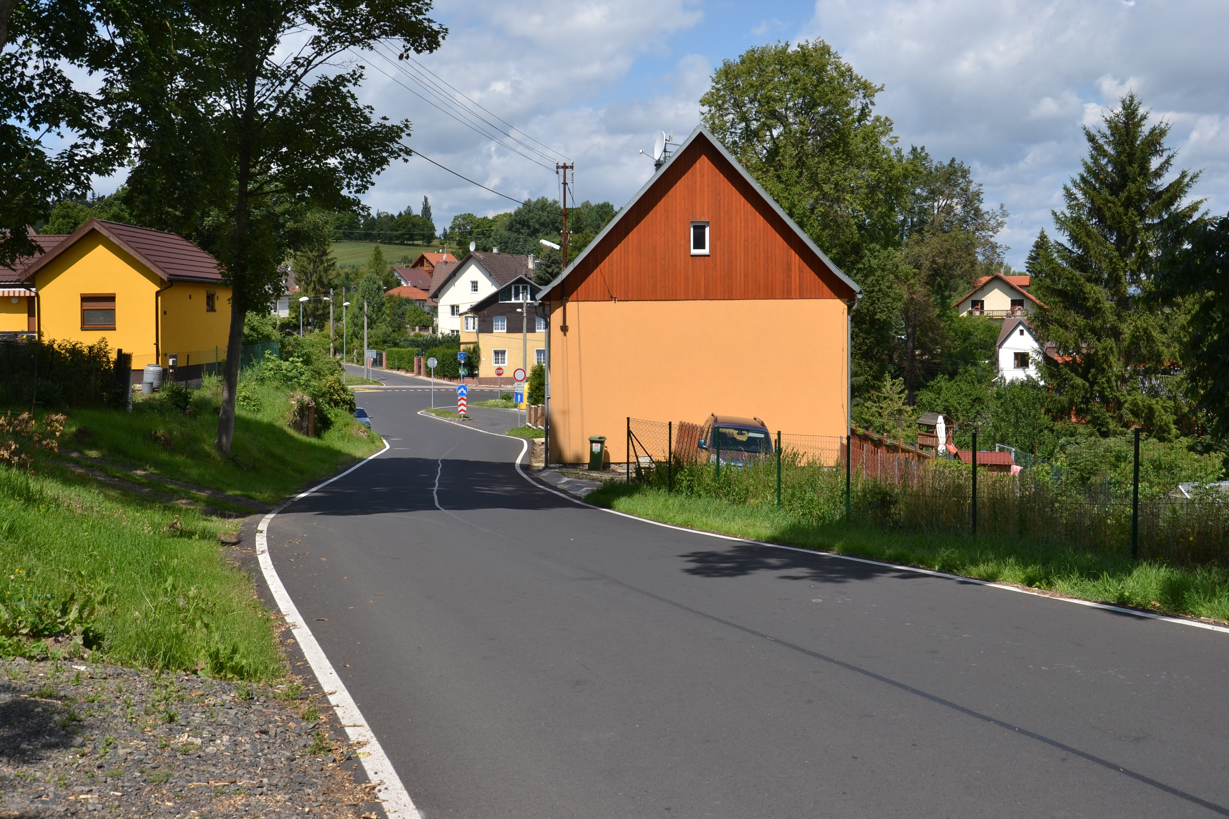 Háje – horní část vesnice